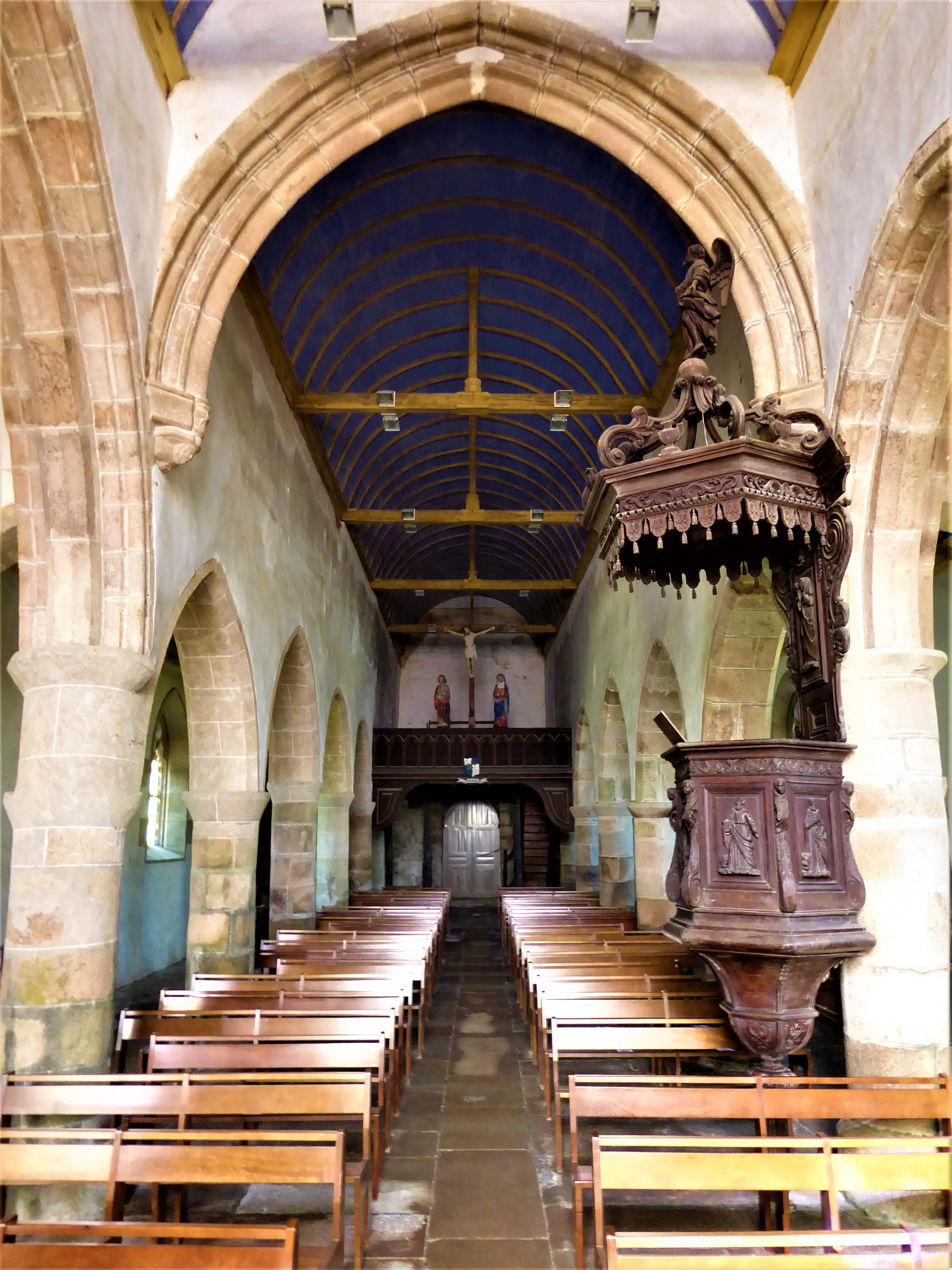 Église Sainte-Anne-et-Saint-Laurent de Trégastel